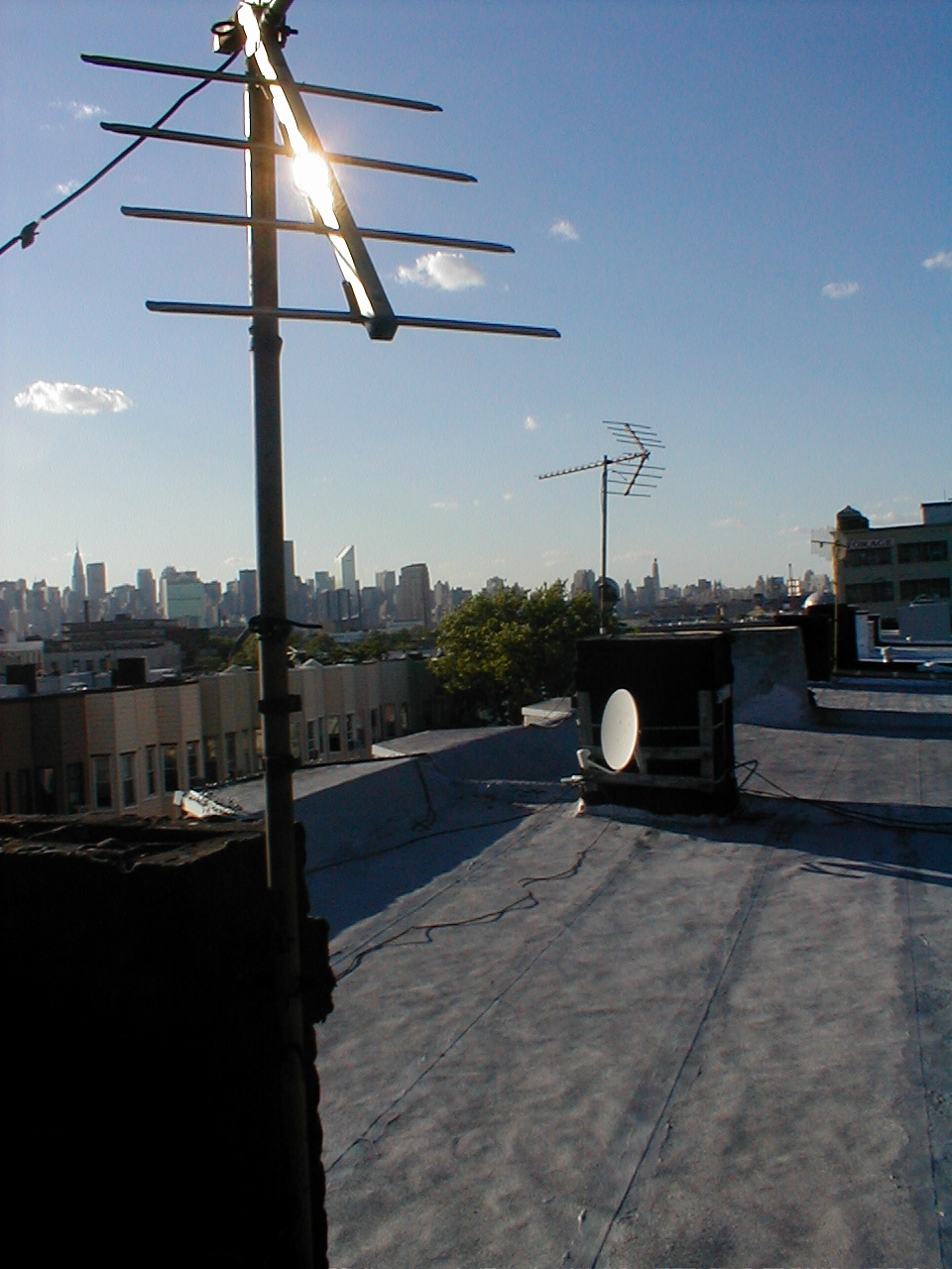 Rooftop Antennae